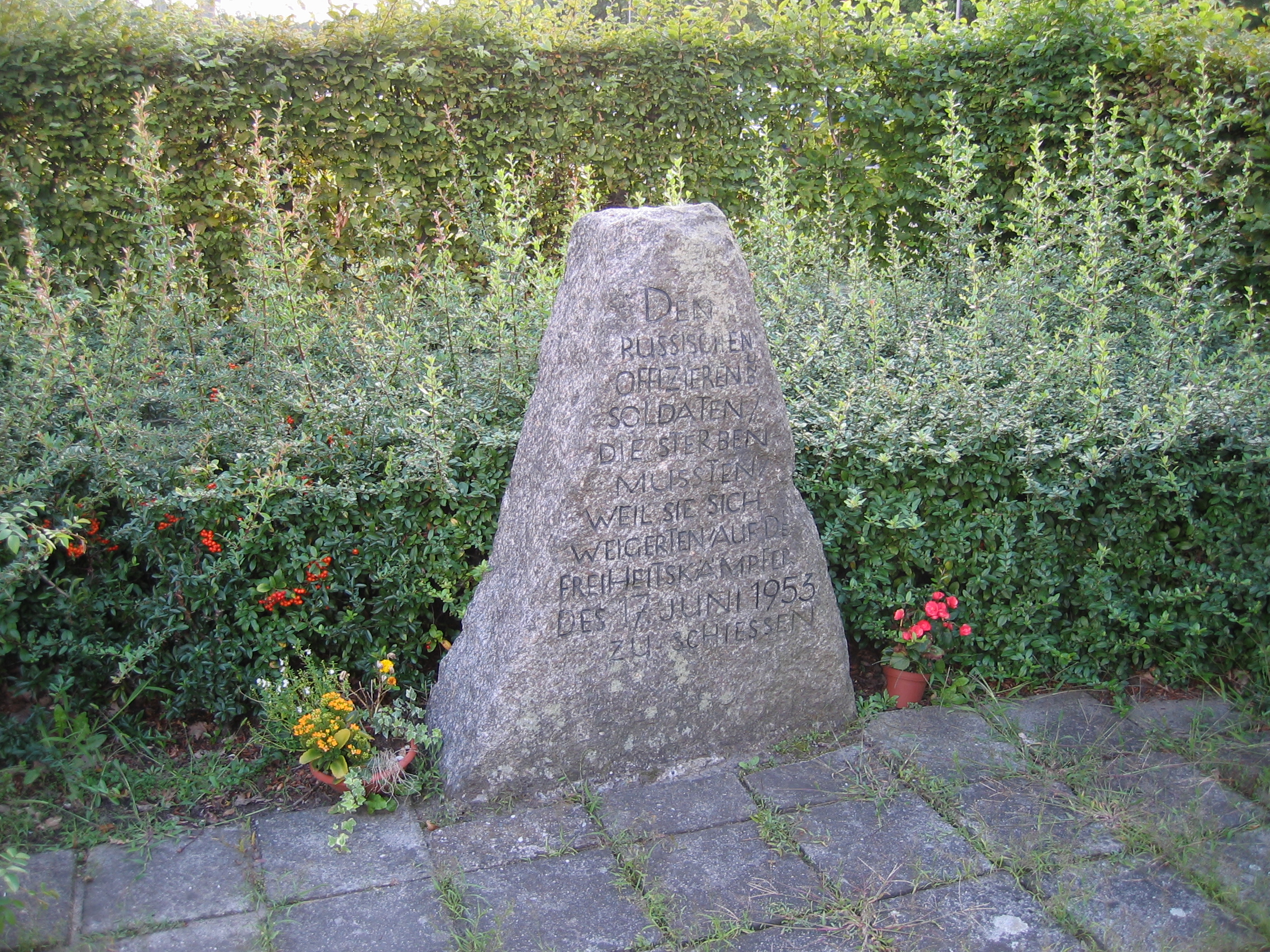 Gedenkstätte 17. Juni 1953 (Berlin), Gedenkstein